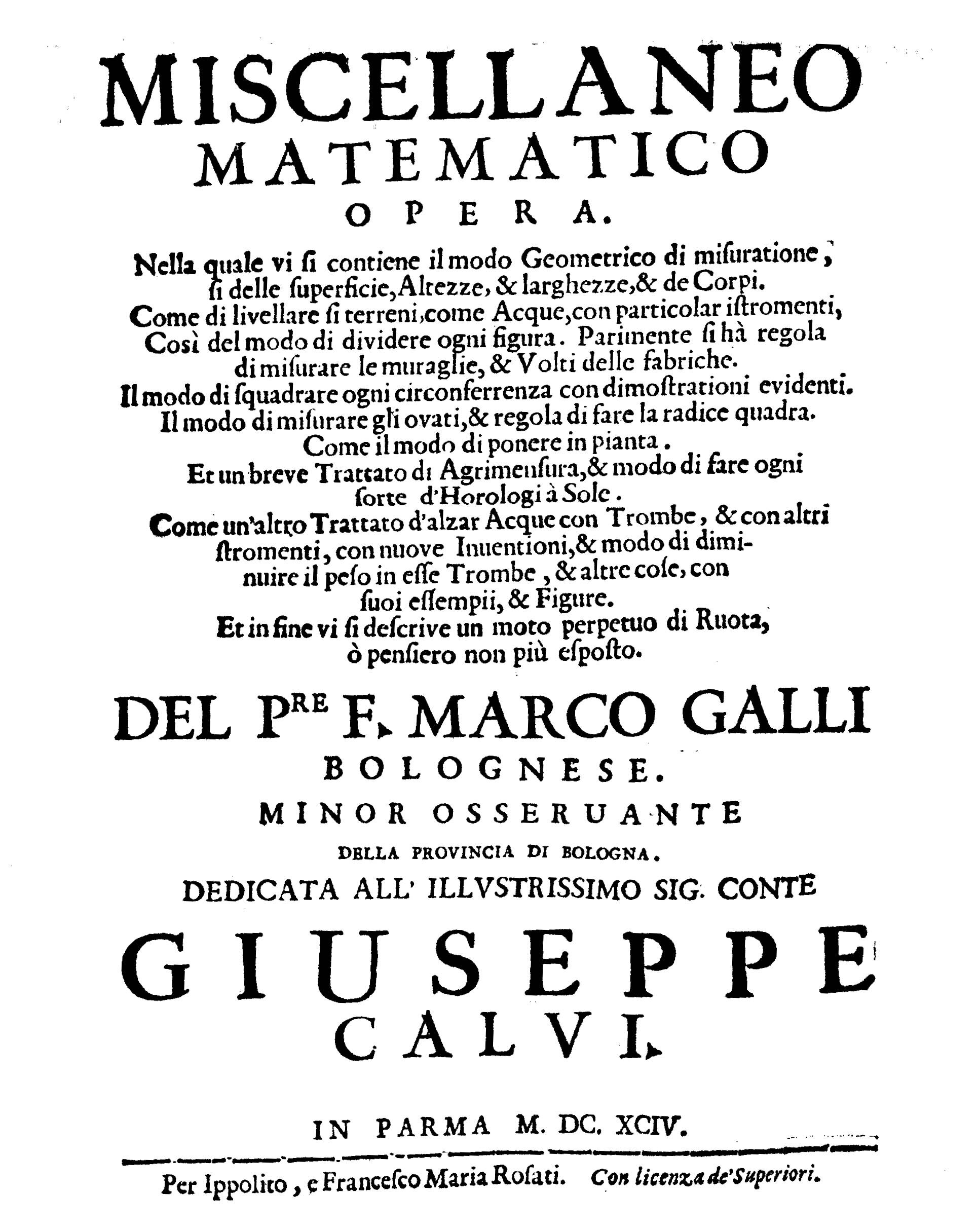 Miscellaneo matematico opera. Nella quale vi si contiene il modo geometrico di misuratione, si delle superficie, altezze, & larghezze, & de corpi. Come di livellare si terreni, come acque, con particolar istromenti, cosi del modo di dividere ogni figura. ... Del p.re f. Marco Galli bolognese. Minor osseruante della provincia di Bologna. Dedicata all'illustrissimo sig. Conte Giuseppe Calvi. - In Parma : per Ippolito, e Francesco Maria Rosati, 1694. - [16], 352, [4] p., 4 c. di tav. ripieg. : ill. ; 4º .